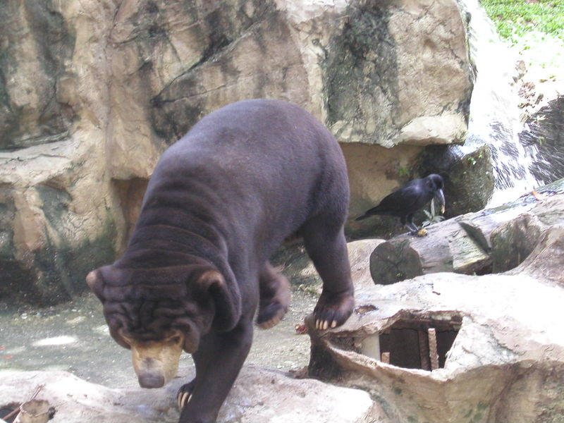 דב שמש ולידו עורב, צולם במהלך טרק בתאילנד